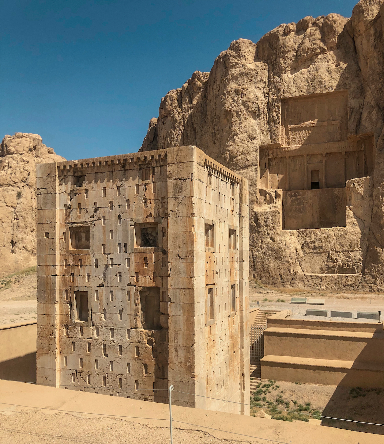 هو نصب تذكاري يمتد قدمه إلى العهد الإخميني، أي حوالي القرن الخامس قبل الميلاد، والنصب مبني على شكل برج في نقش رستم، وهي من الآثار العالمية المهمة، تقع في شمال غرب برسبوليس في إيران،